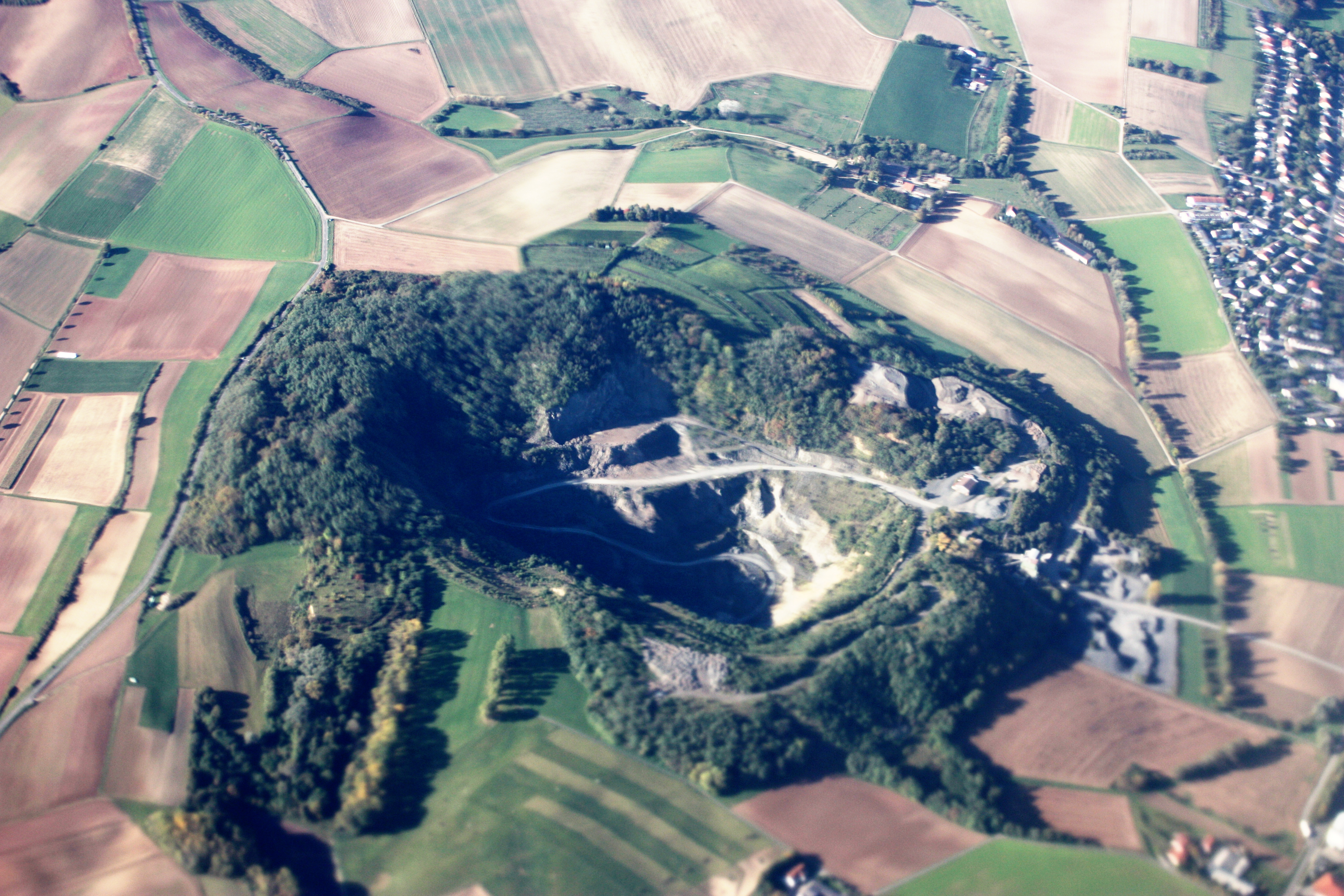 1 Flug von Frankfurt/Main nach Sofia; Start 10:12 MEZ; Landung 13:06 MEZ; Oktober 2010; Basalt-Steinbruch der Odenwälder Hartstein-Industrie im Roßberg bei Roßdorf (bei Darmstadt)